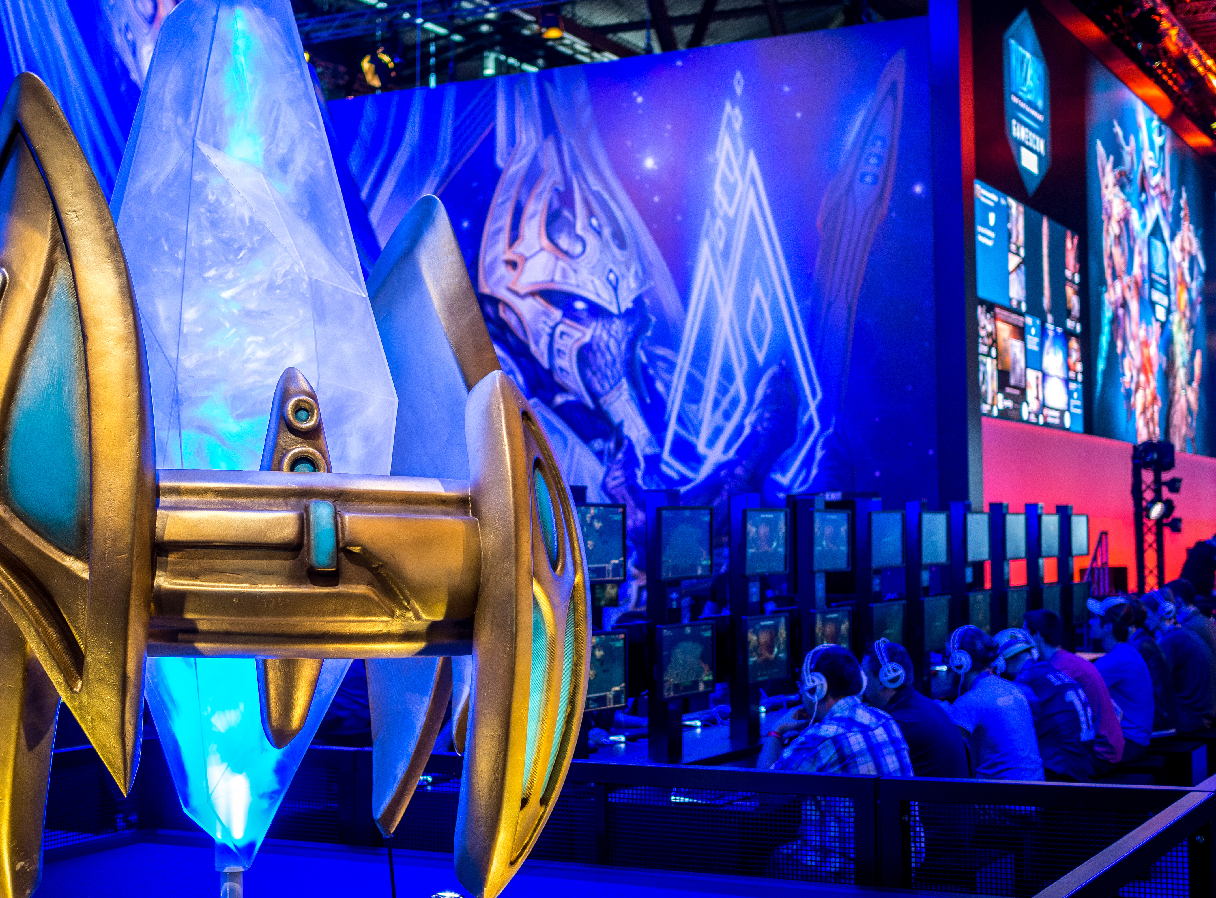 Gamescom 2015, Cologne